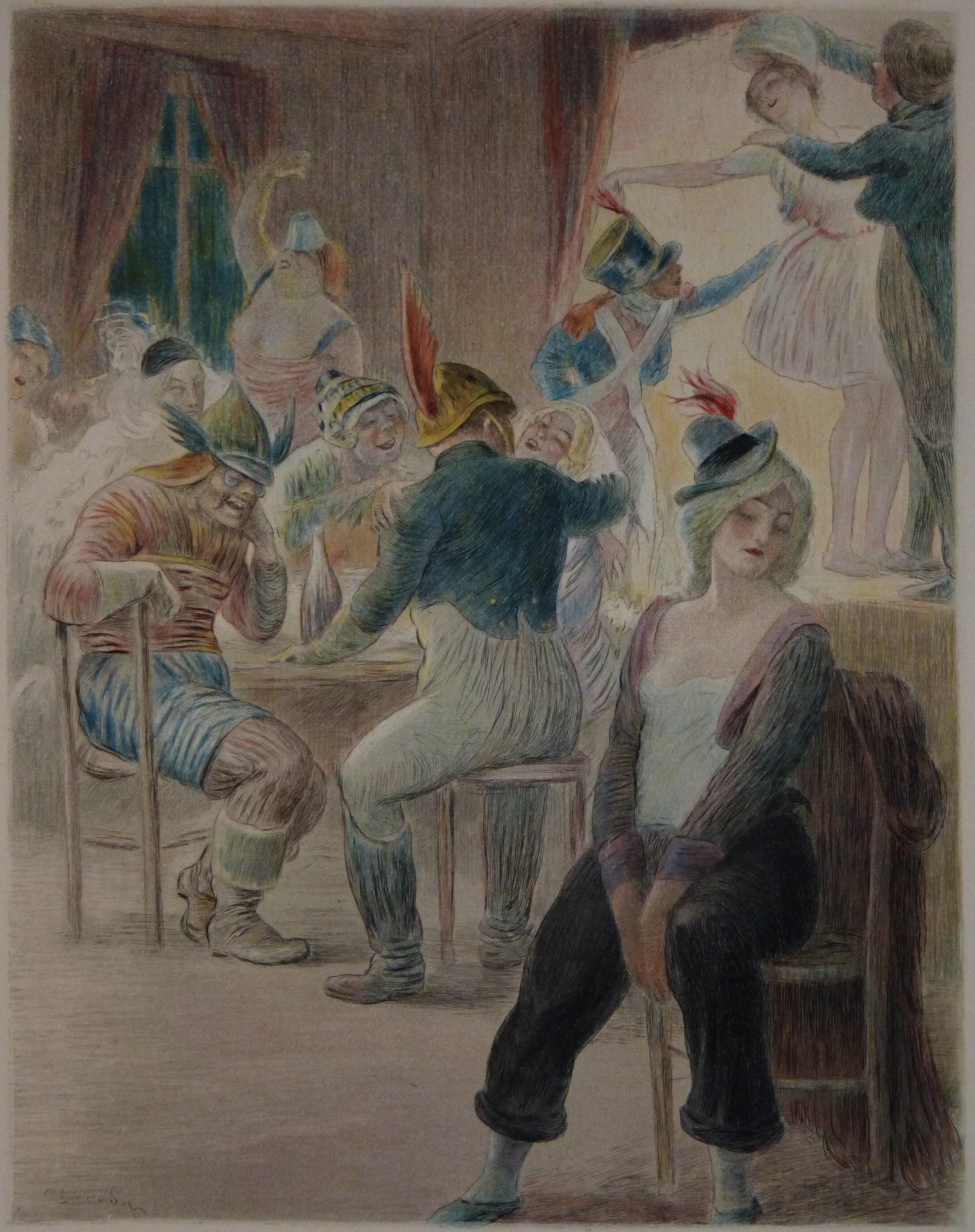 Illustration de Charles Léandre pour le livre Madame Bovary de Flaubert, gravé à l’eau-forte en couleur par Eugène Decisy. Illustration hors-texte de la page 322 : Emma en travesti au bal